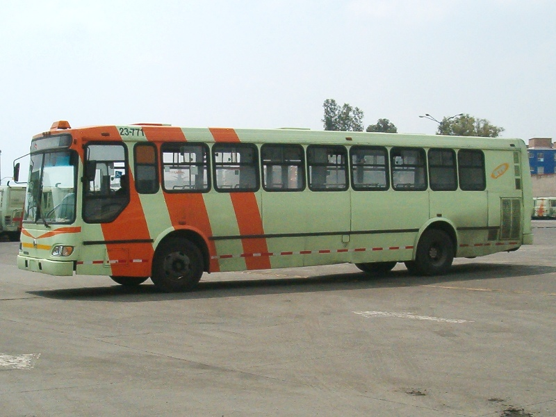 AYCO 3000RE, un autobús de la Red de Transporte de Pasajeros del D. F.